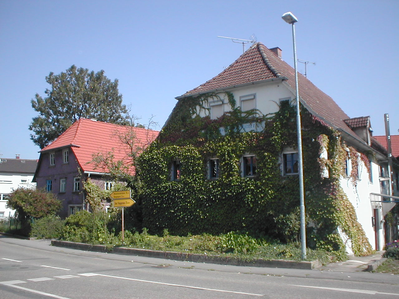 Markante historische Gebäude an der Hauptkreuzung in Babstadt. Rechts das historische ehemalige Gasthaus "Ritter"